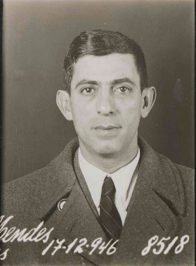 Fotografia do escrito e ativista político Manuel Mendes (1906-1969) extraída da ficha prisional da polícia política portuguesa quando da sua detenção em 17 de dezembro de 1946